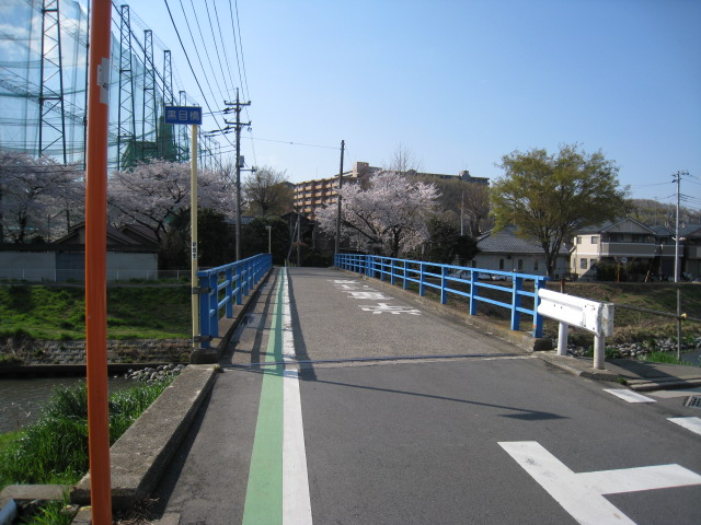 Kurome Bridge, Saitama, Japan